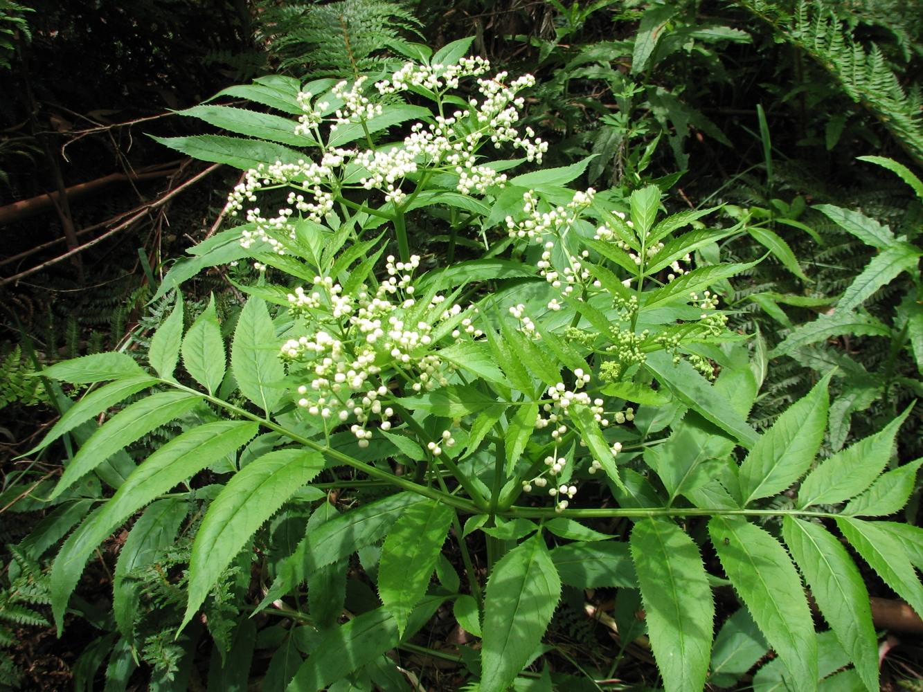 Sambucus gaudichaudiana, Mount Donna Buang, Victoria, Australia